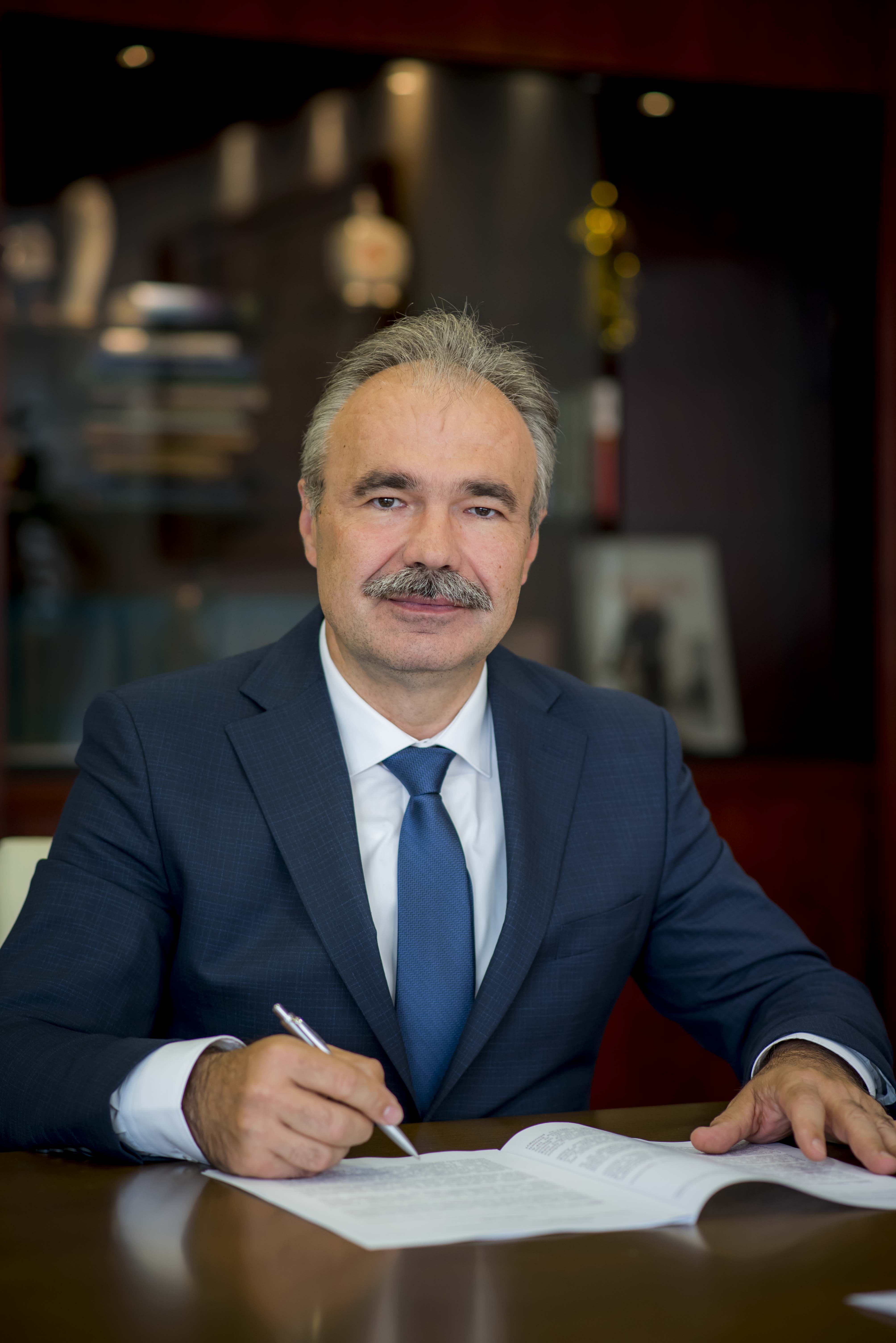 Nagy István (Újfehértó, 1967. október 6. –) magyar agrármérnök, politikus, 2010 óta a Fidesz-KDNP országgyűlési képviselője. A Győr-Moson-Sopron megyei 5. számú országgyűlési egyéni választókerület képviselője. A negyedik Orbán-kormányban az Agrárminisztérium minisztere.